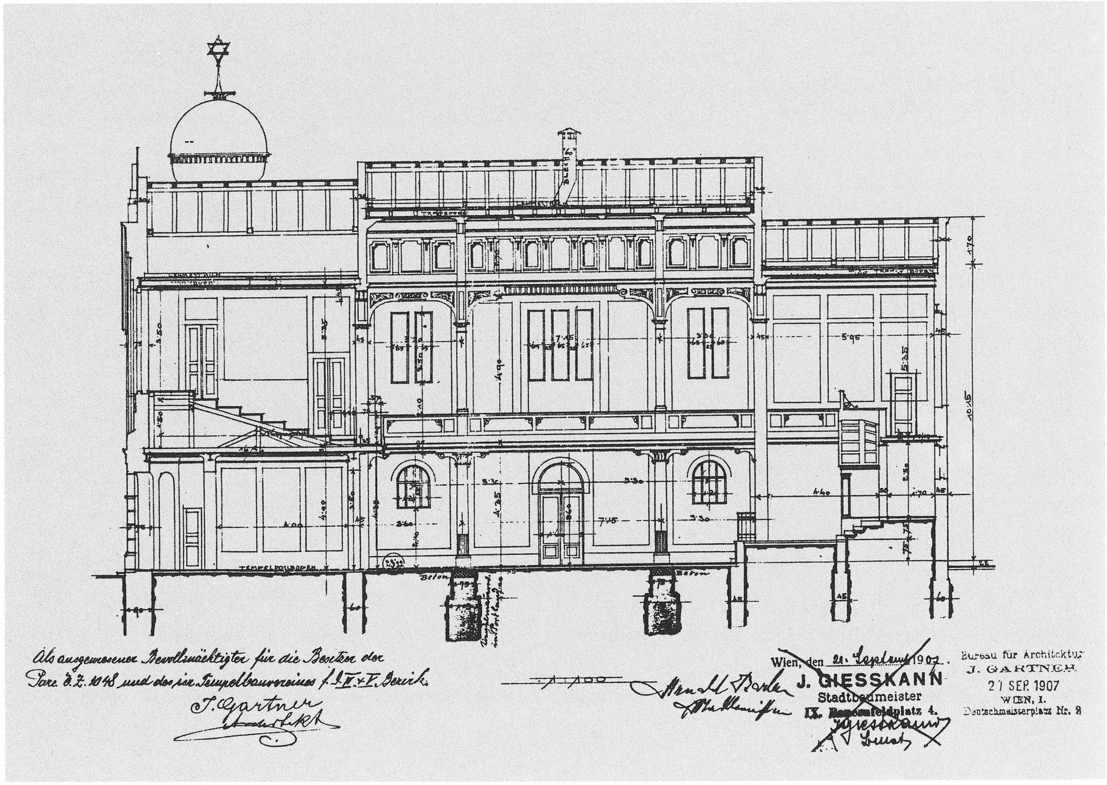 Die Synagogue in der Siebenbrunnengasse, Längsschnitt, Baupläne von Jakob Gartner.